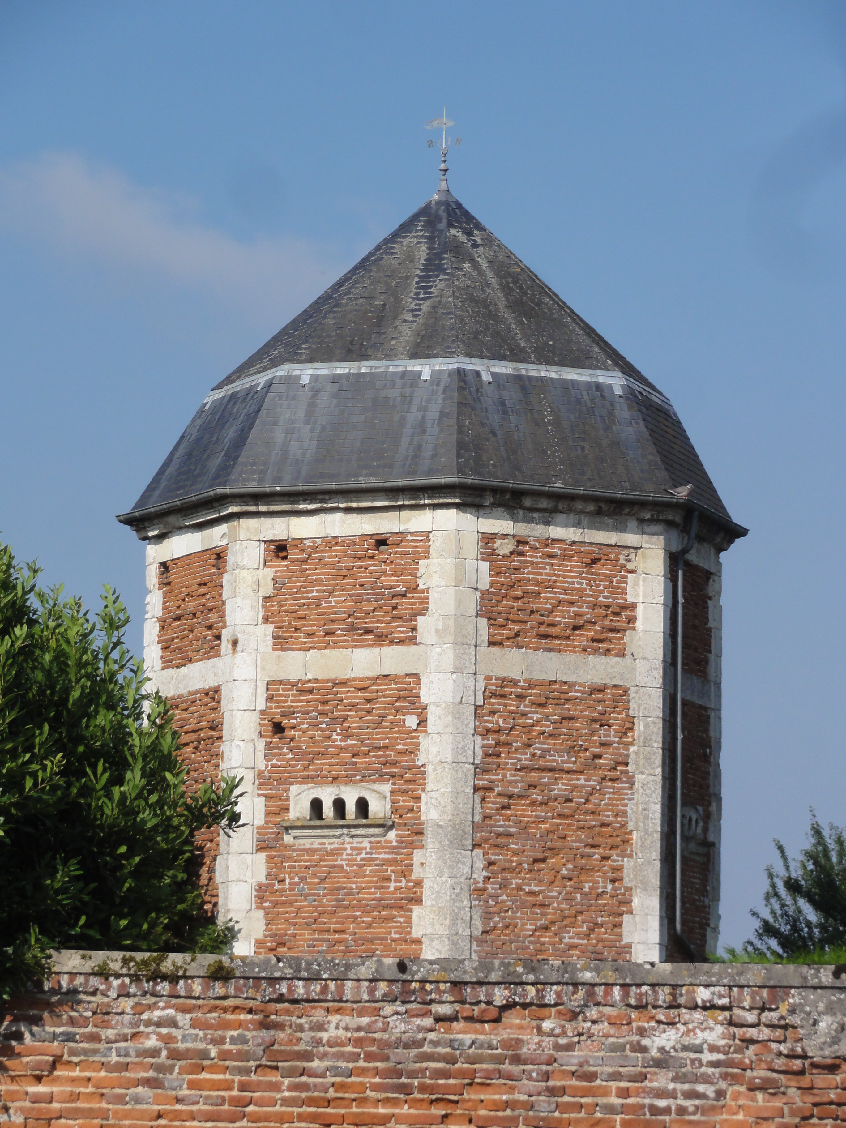 Marcy (Aisne) tour-pigeonnier